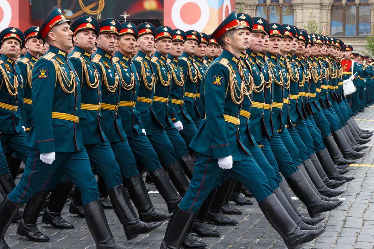 В Москве прошел парад в честь 74-й годовщины Победы в Великой Отечественной войне